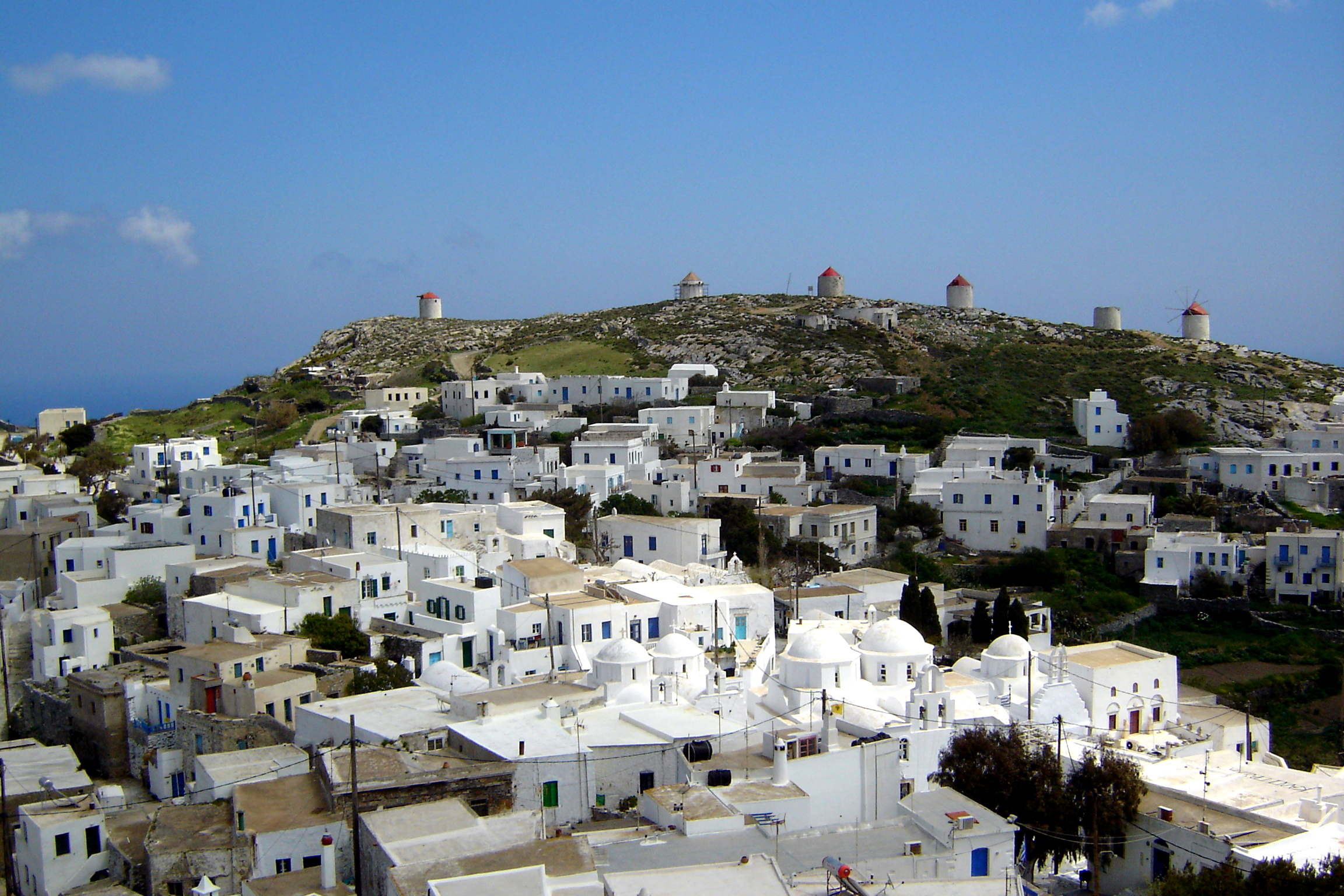 Η Χώρα της Αμοργού